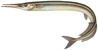 Зарган